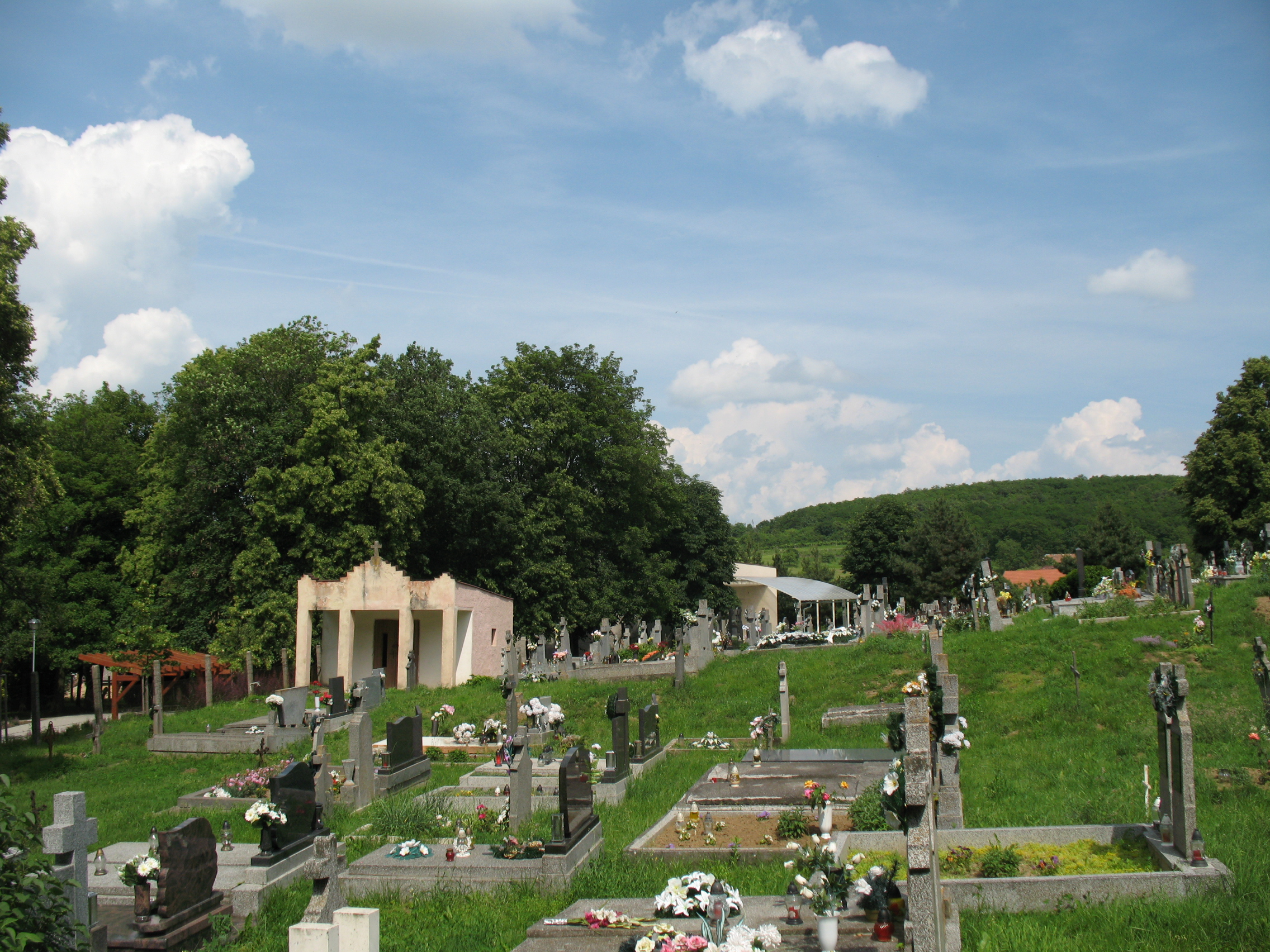 Cseke